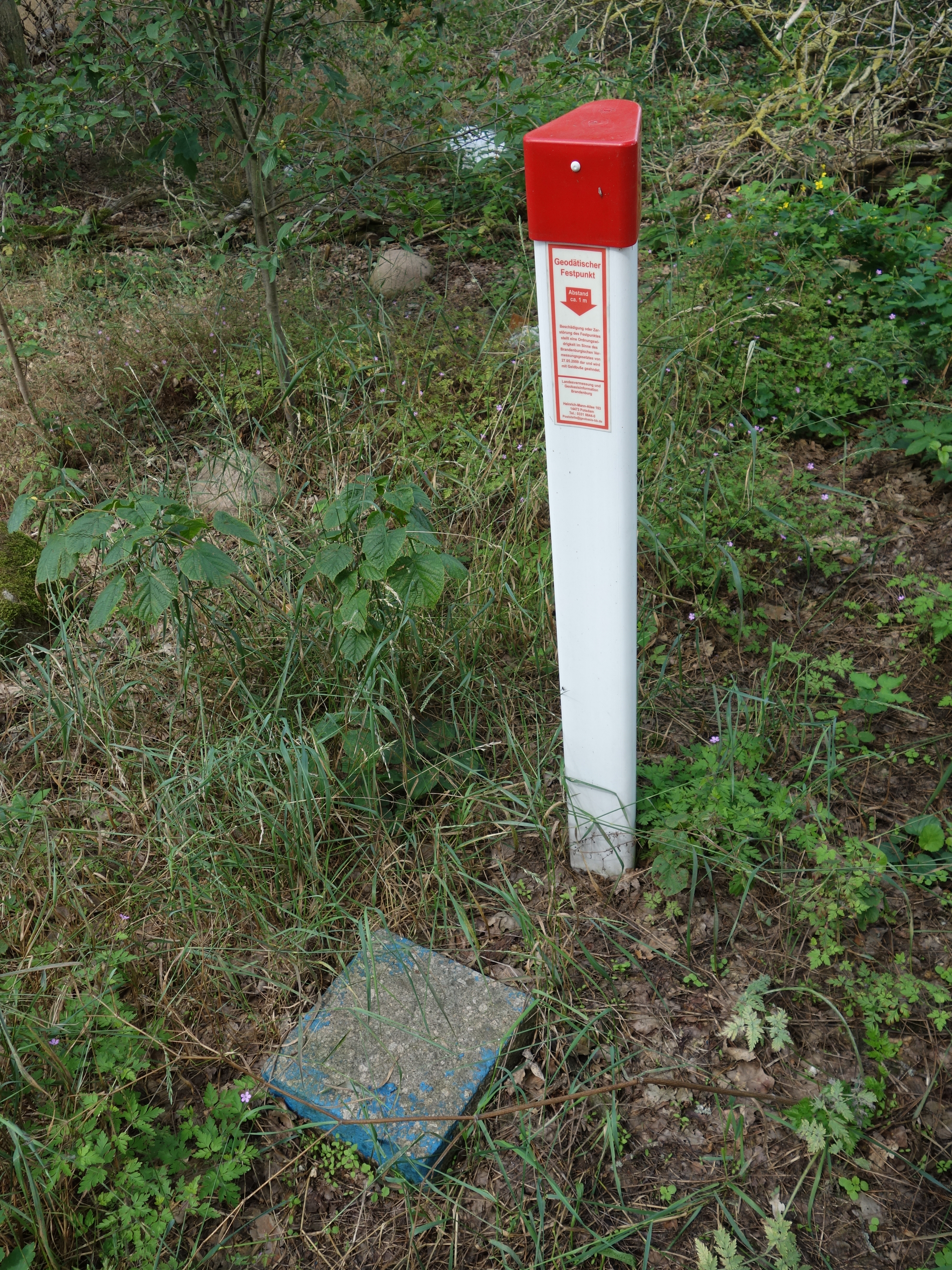 Geodätischer Punkt 32040 bei Triglitz 2020 (E: 304494.11223 N: 5901607.19612)